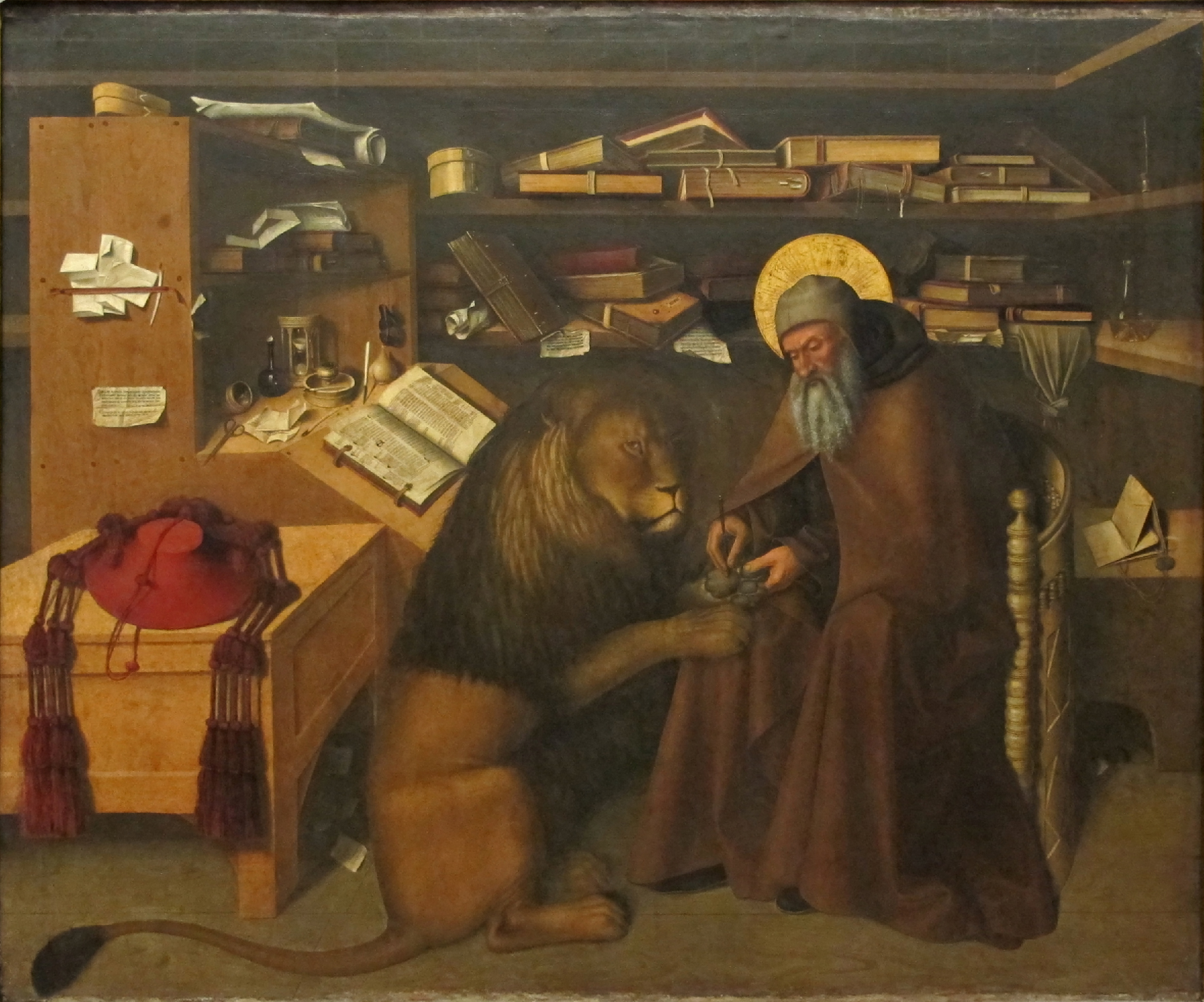 Der heilige Hieronymus zieht einem Löwen einen Dorn aus der Pranke. Der Löwe wird daraufhin sein treuer Diener.[1]